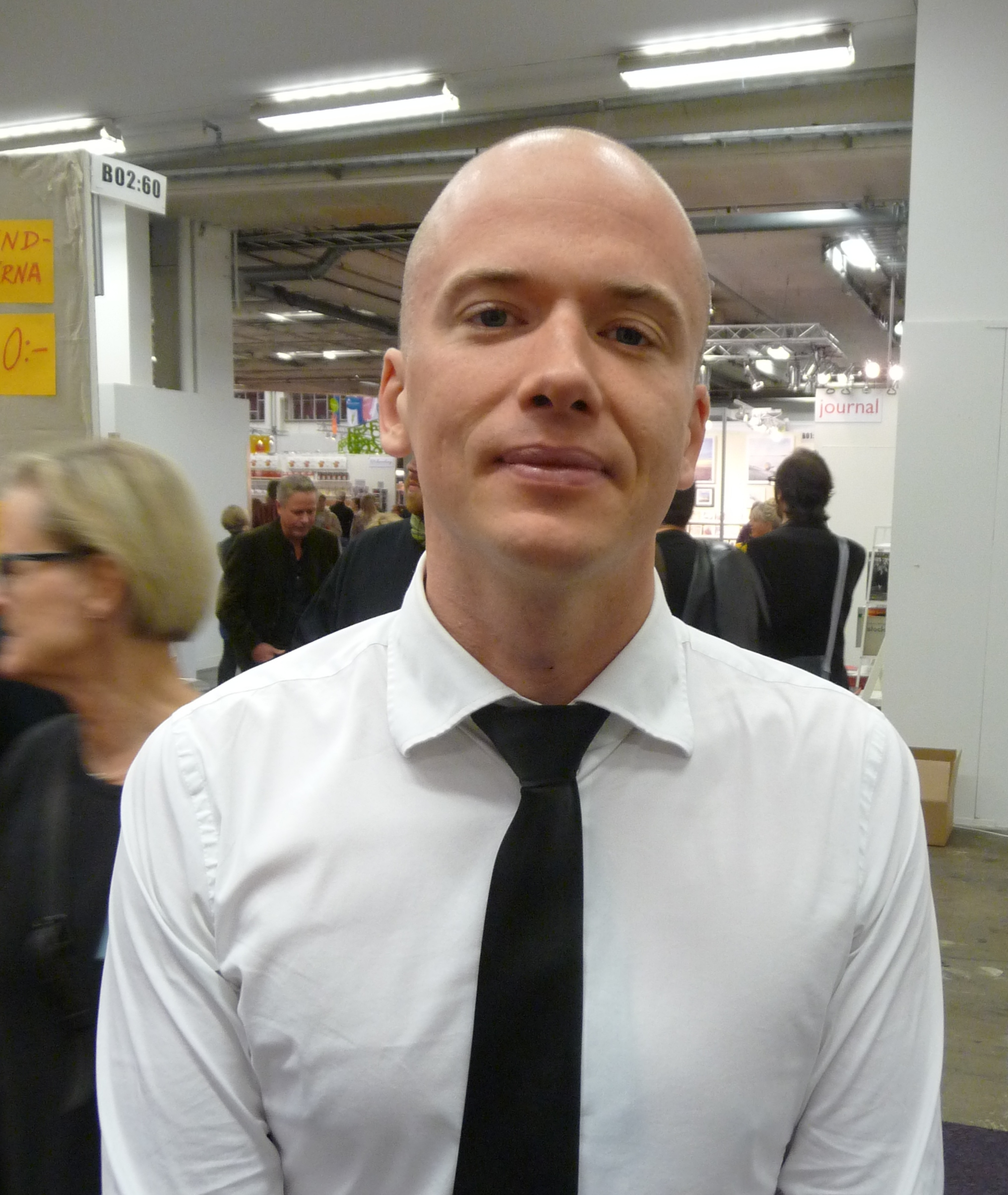 Daniel Åberg på bokmässan i Göteborg 2009